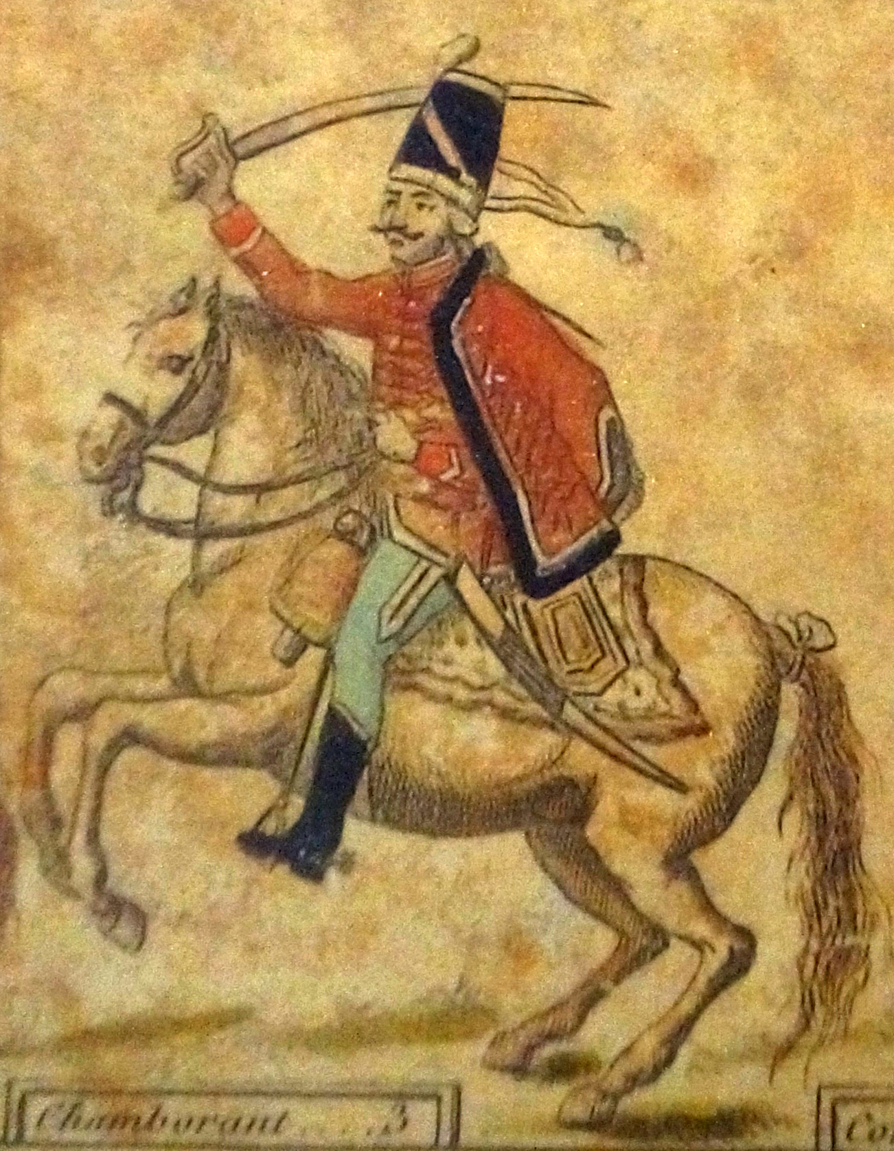 Peinture présentée au Musée de l'Armée.